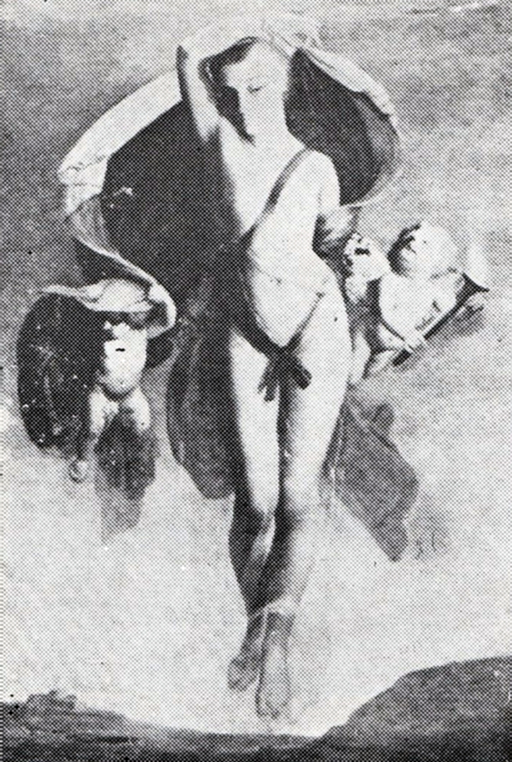 Aurora - Pinacoteca Statului din București